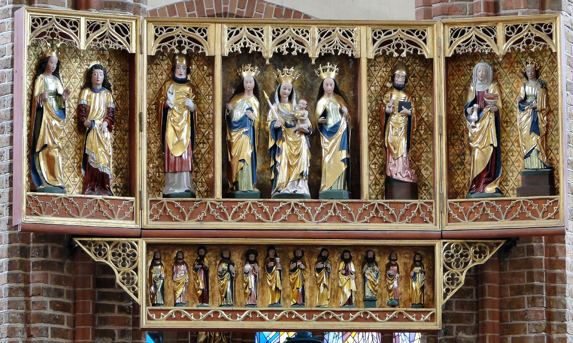 Szczecin Katedra św. Jakuba